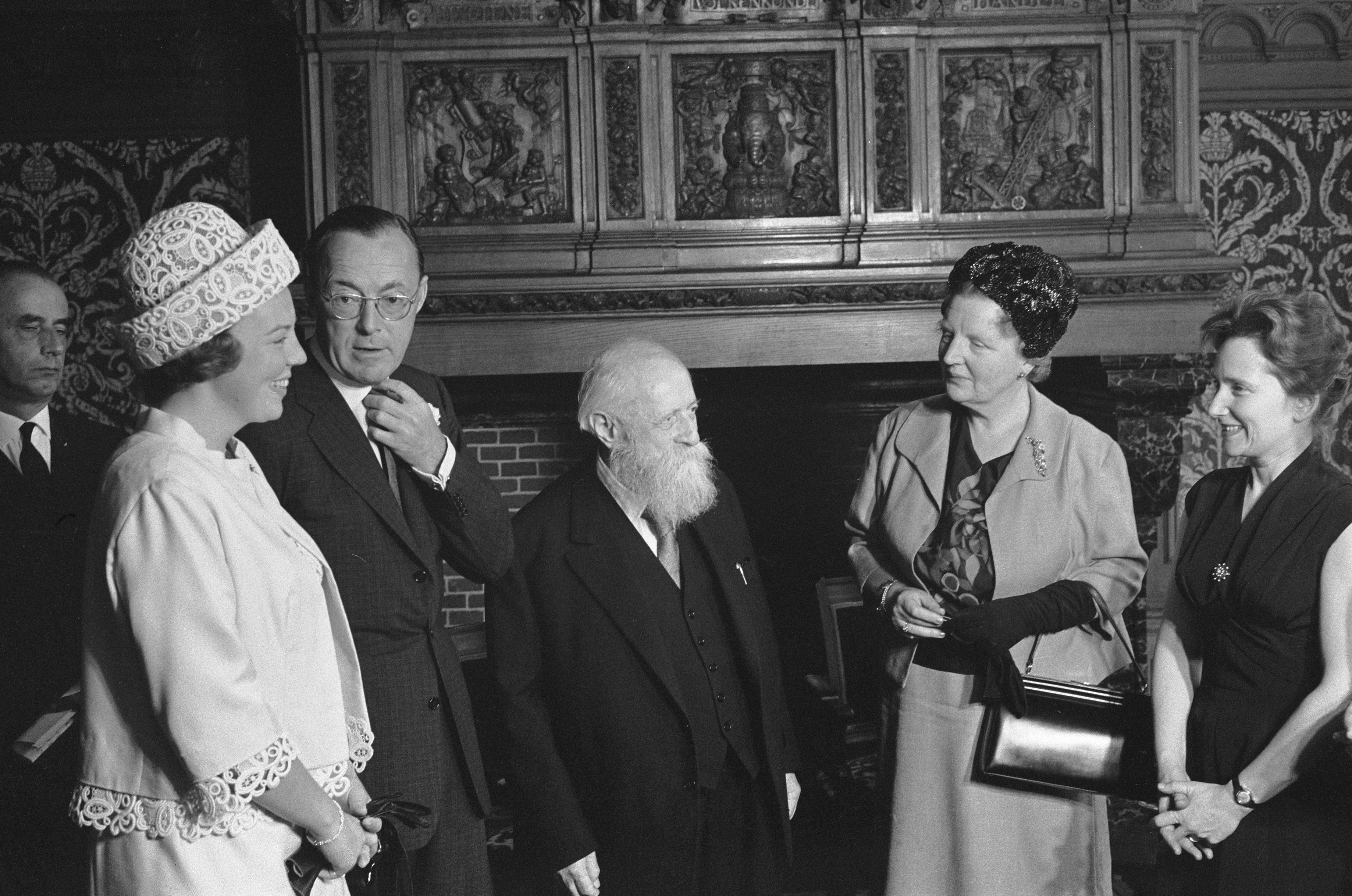 Collectie / Archief : Fotocollectie Anefo Reportage / Serie : Uitreiking van de Erasmusprijs 1963 aan professor Martin Buber in het Tropenmuseum in Amsterdam Beschrijving : V.l.n.r. prinses Beatrix, prins Bernhard, Martin Buber en koningin Juliana Datum : 3 juli 1963 Locatie : Amsterdam, Noord-Holland Trefwoorden : filosofen, groepsportretten, koninginnen, prijsuitreikingen, prinsen, prinsessen Persoonsnaam : Beatrix (kroonprinses Nederland), Bernhard (prins Nederland), Buber, Martin, Juliana (koningin Nederland) Instellingsnaam : Tropenmuseum Fotograaf : Fotograaf Onbekend / Anefo, [onbekend] Auteursrechthebbende : Nationaal Archief Materiaalsoort : Negatief (zwart/wit) Nummer archiefinventaris : bekijk toegang 2.24.01.05 Bestanddeelnummer : 915-3280